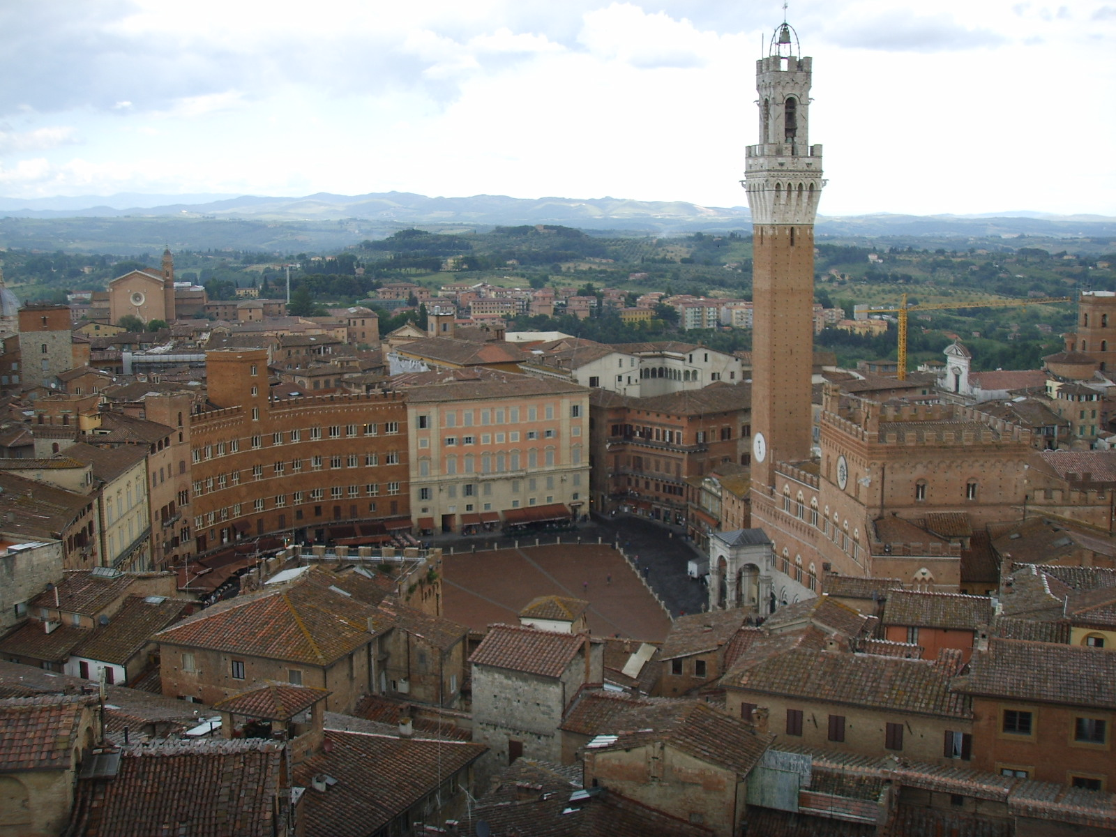 Piazza del Campo, in Siena, Italy